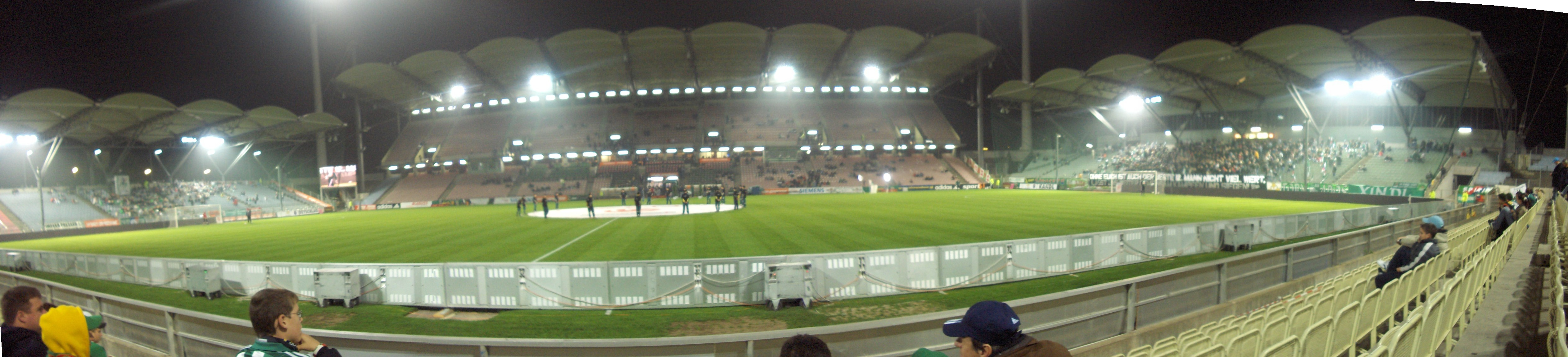 Hanappi Stadion. Rapid Wien - GAK